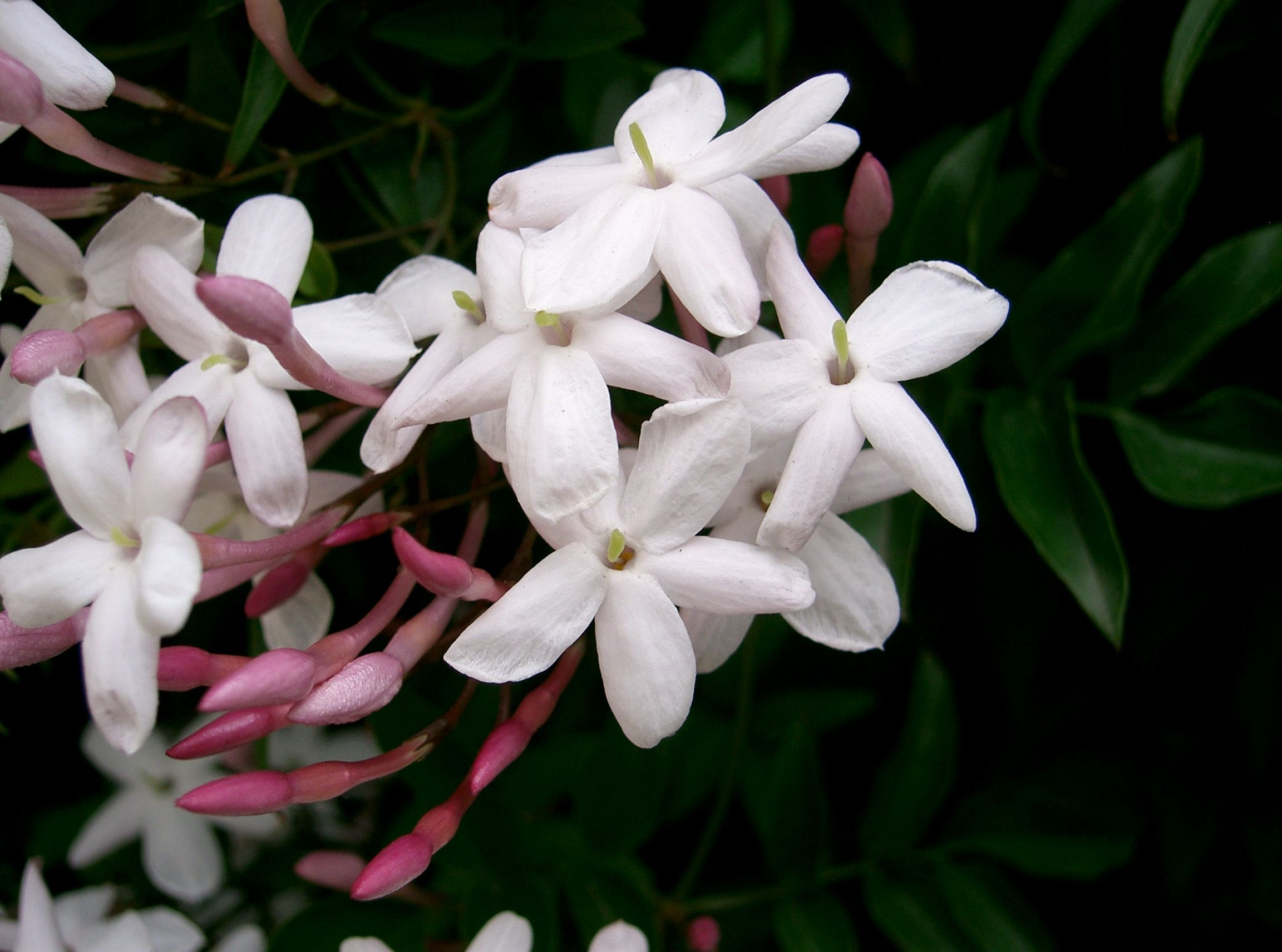 Jasminum polyanthum, Place:Osaka-fu Japan